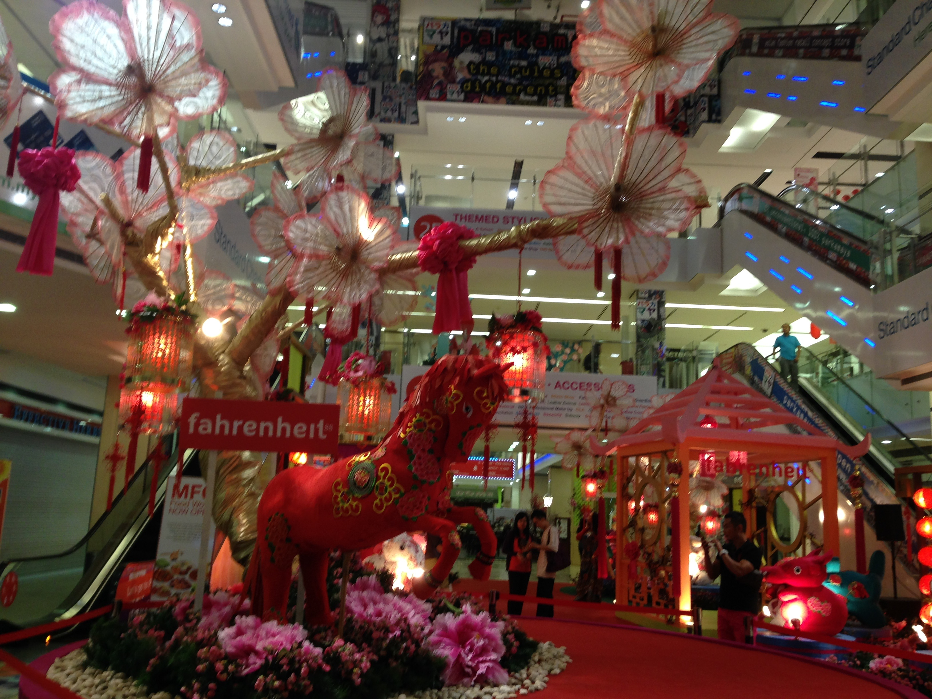 Fahrenheit 88 2014 Chinese New Year Decoration